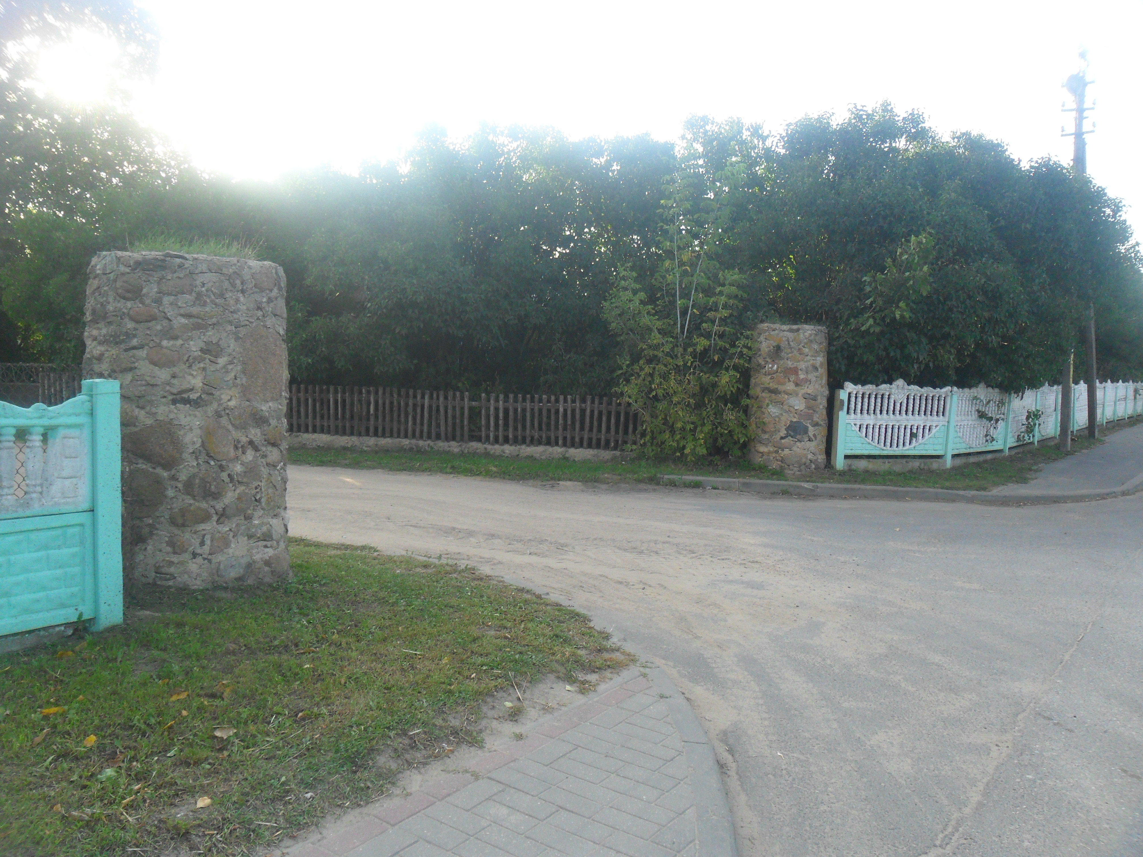 Брама пры былой сядзібе Міклашэвічаў у Гудзевічах Мастоўскага раёна Гродзенскай вобласці Беларусі